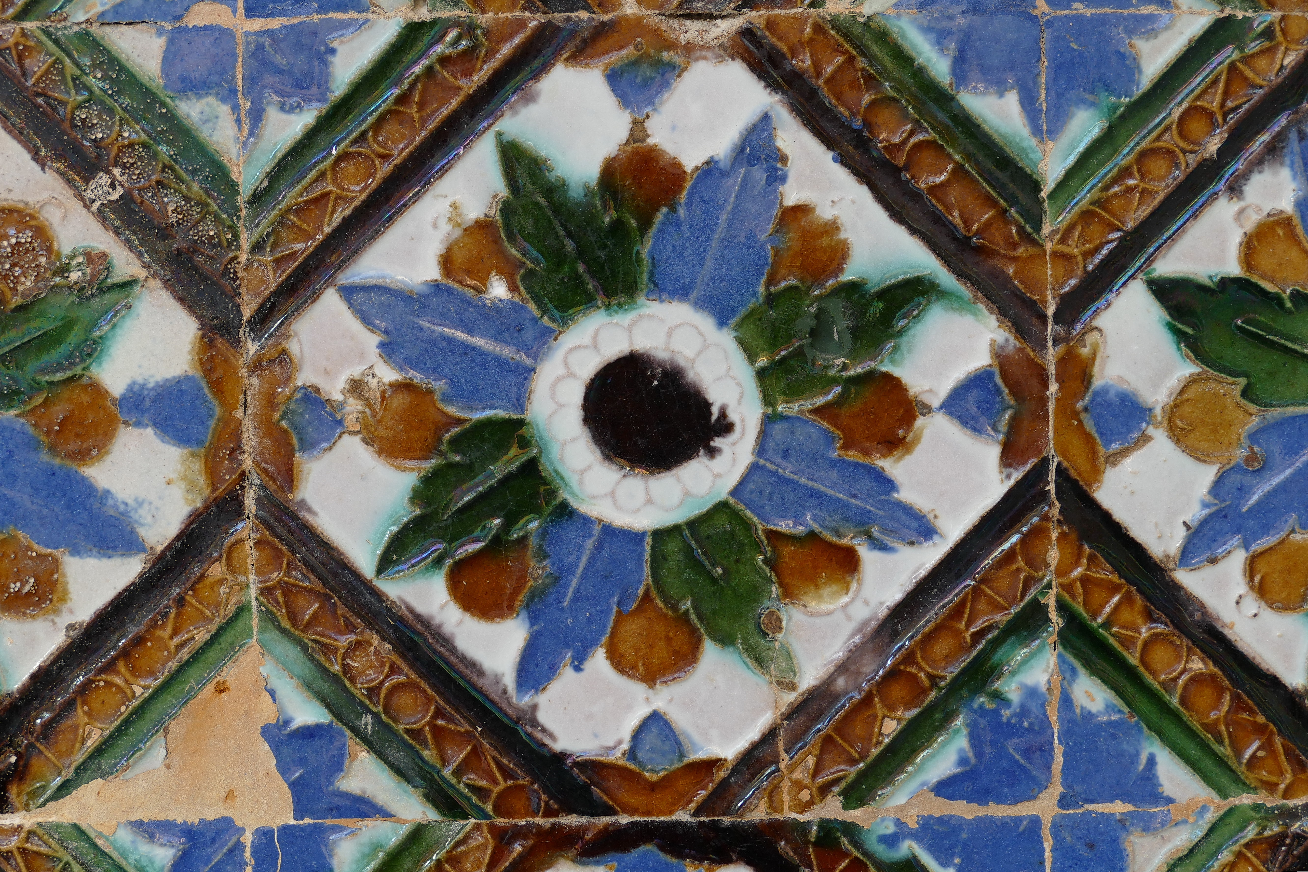 Fliesen im Casa de Pilatos in Sevilla, Spanien